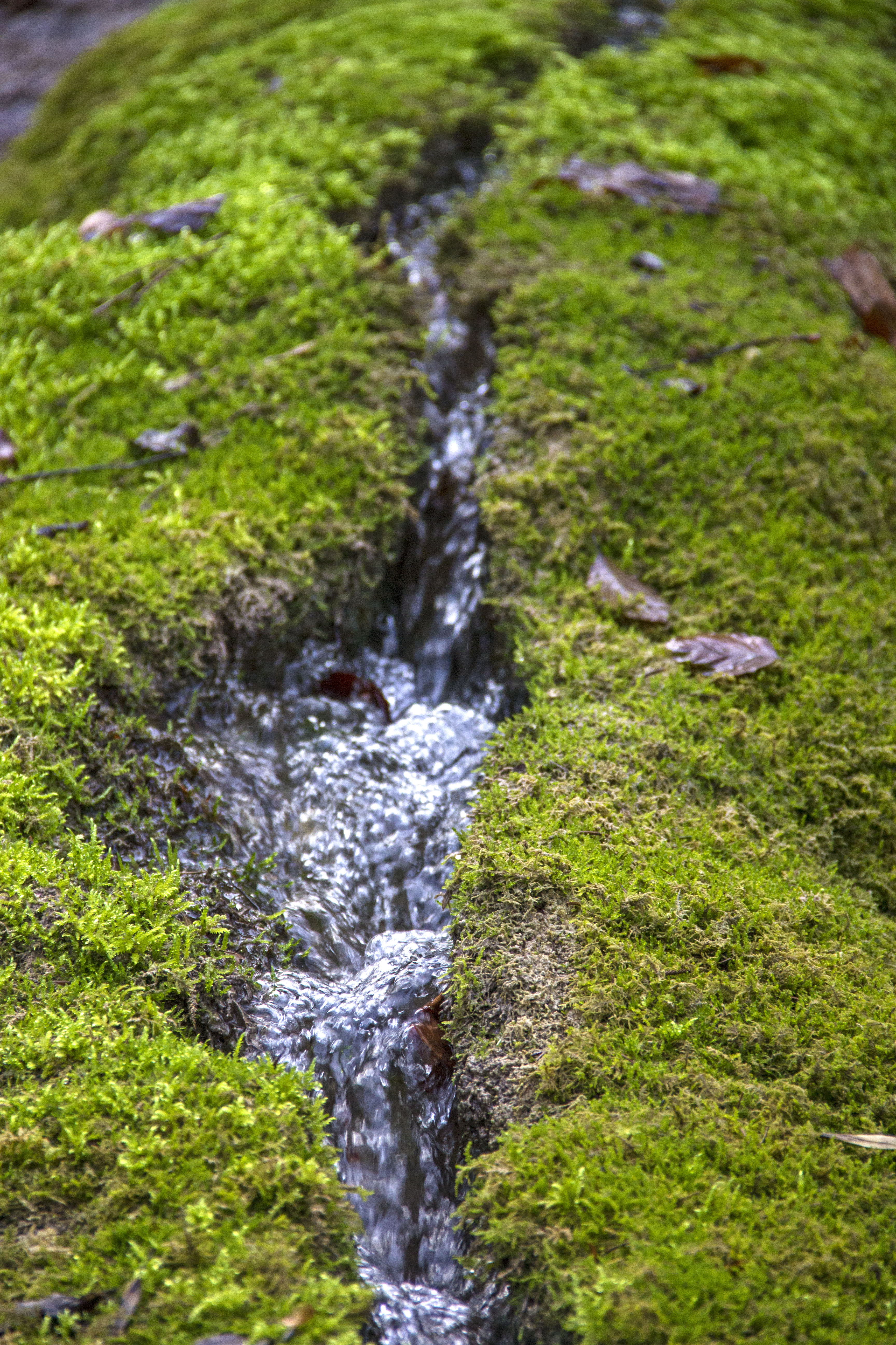 Steinerne Rinne, Erasbach, Berching